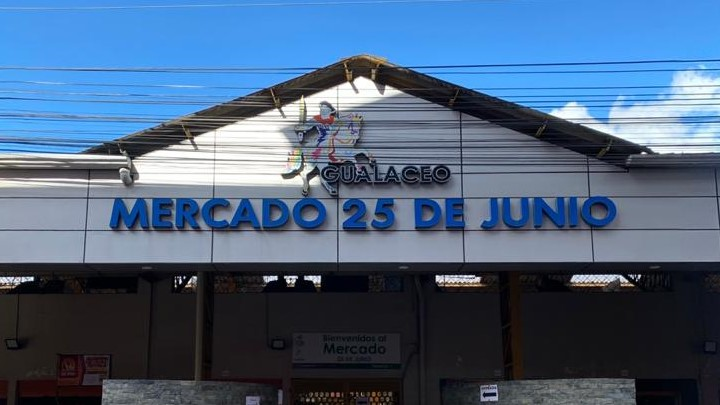 Mercado Central de Gualaceo